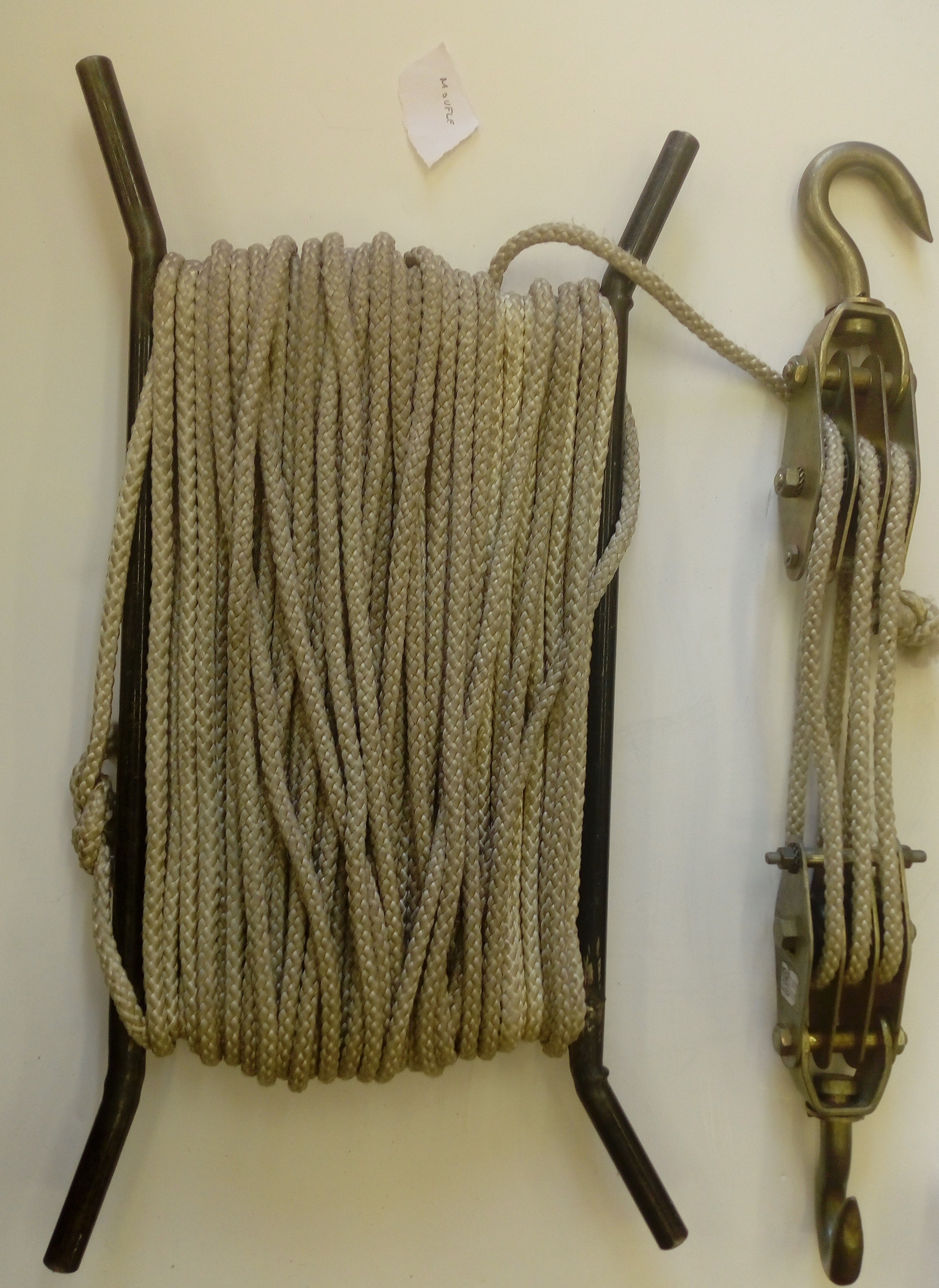 La moufle ou poulie de mouflage est utilisée pour attacher ou détacher les lustres.